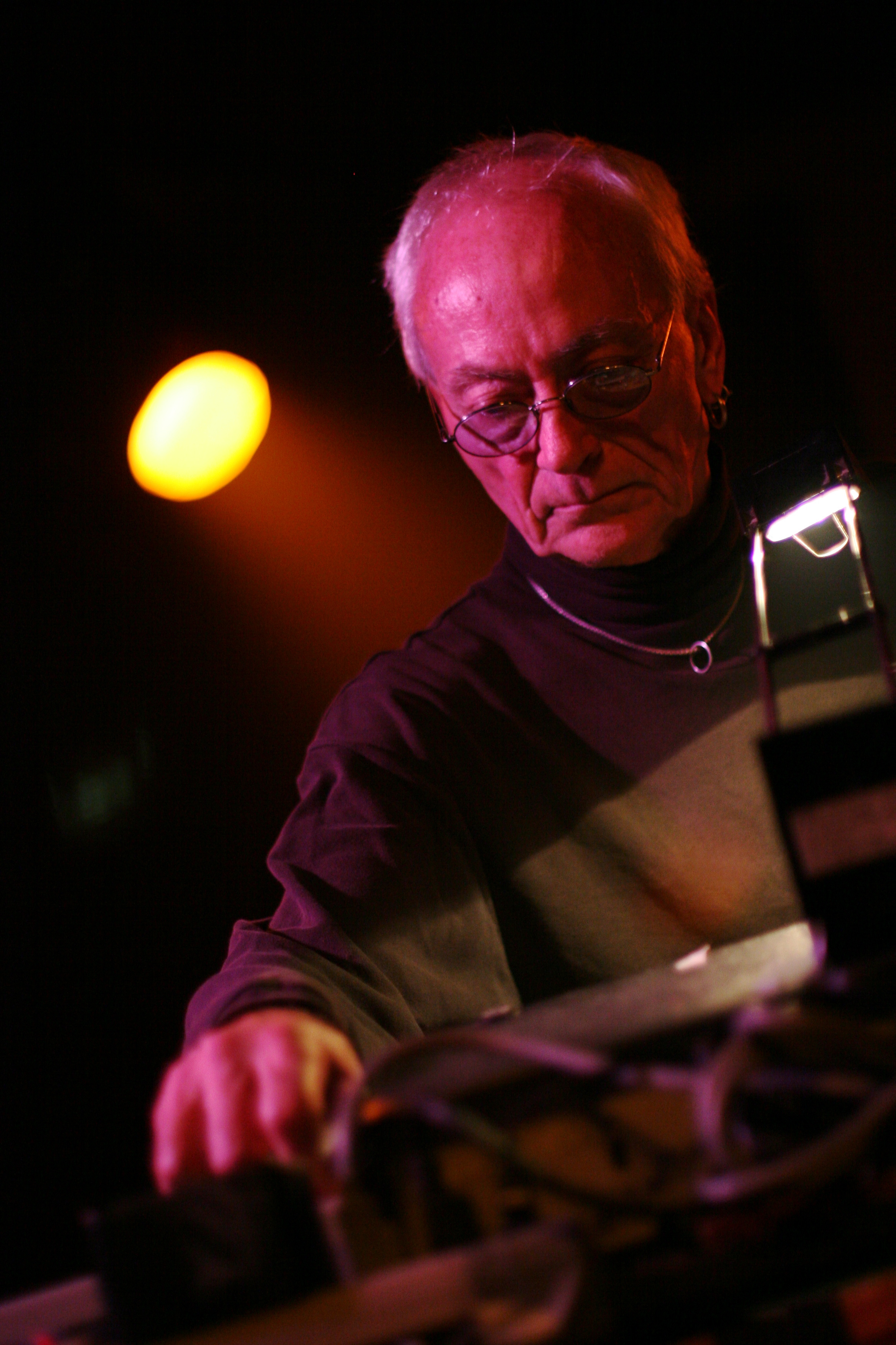 Silver Apples à Barcelona, Salle Apolo La